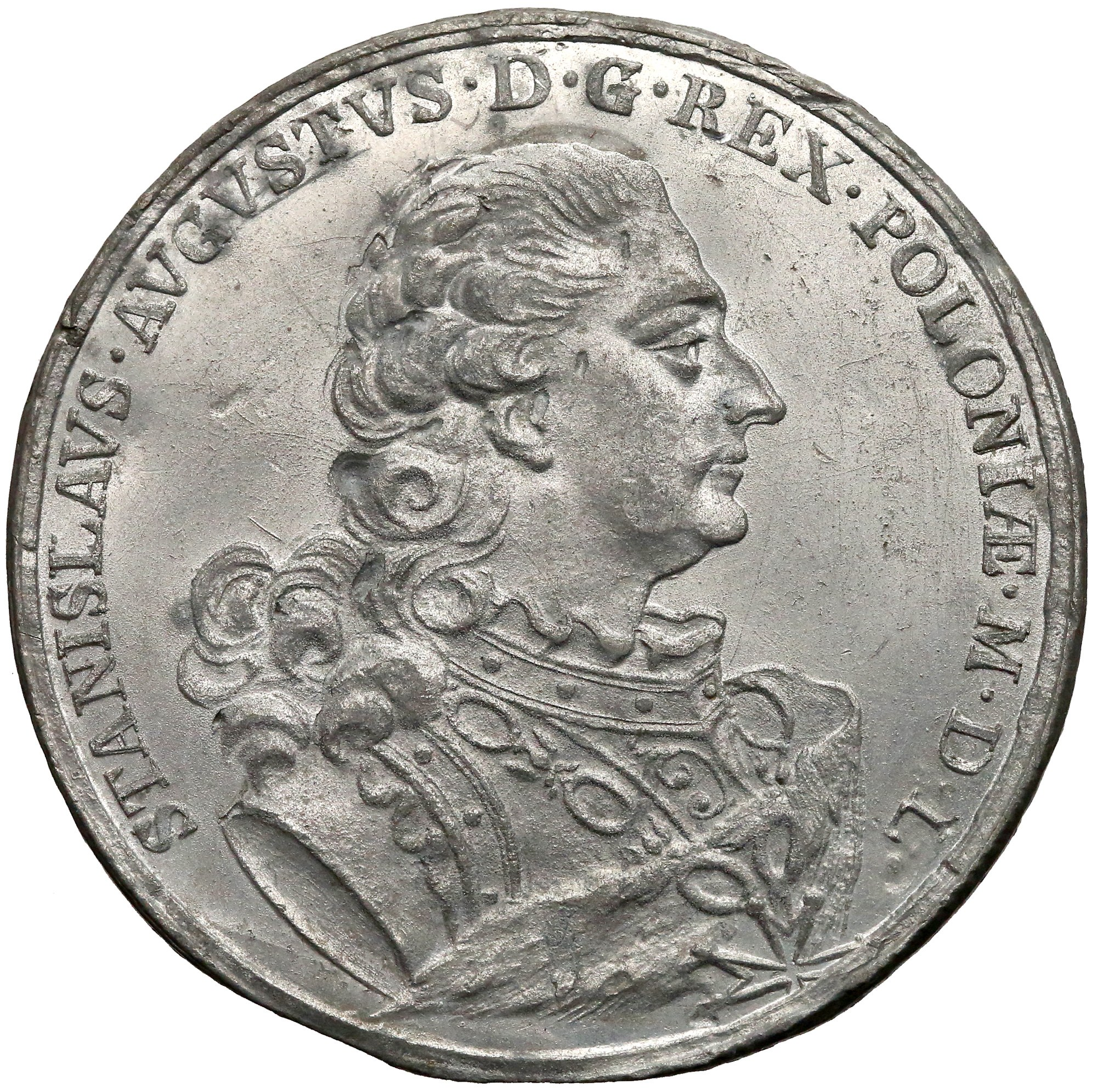 Fałszerstwo Majnerta talara Stanisława Augusta Poniatowskiego